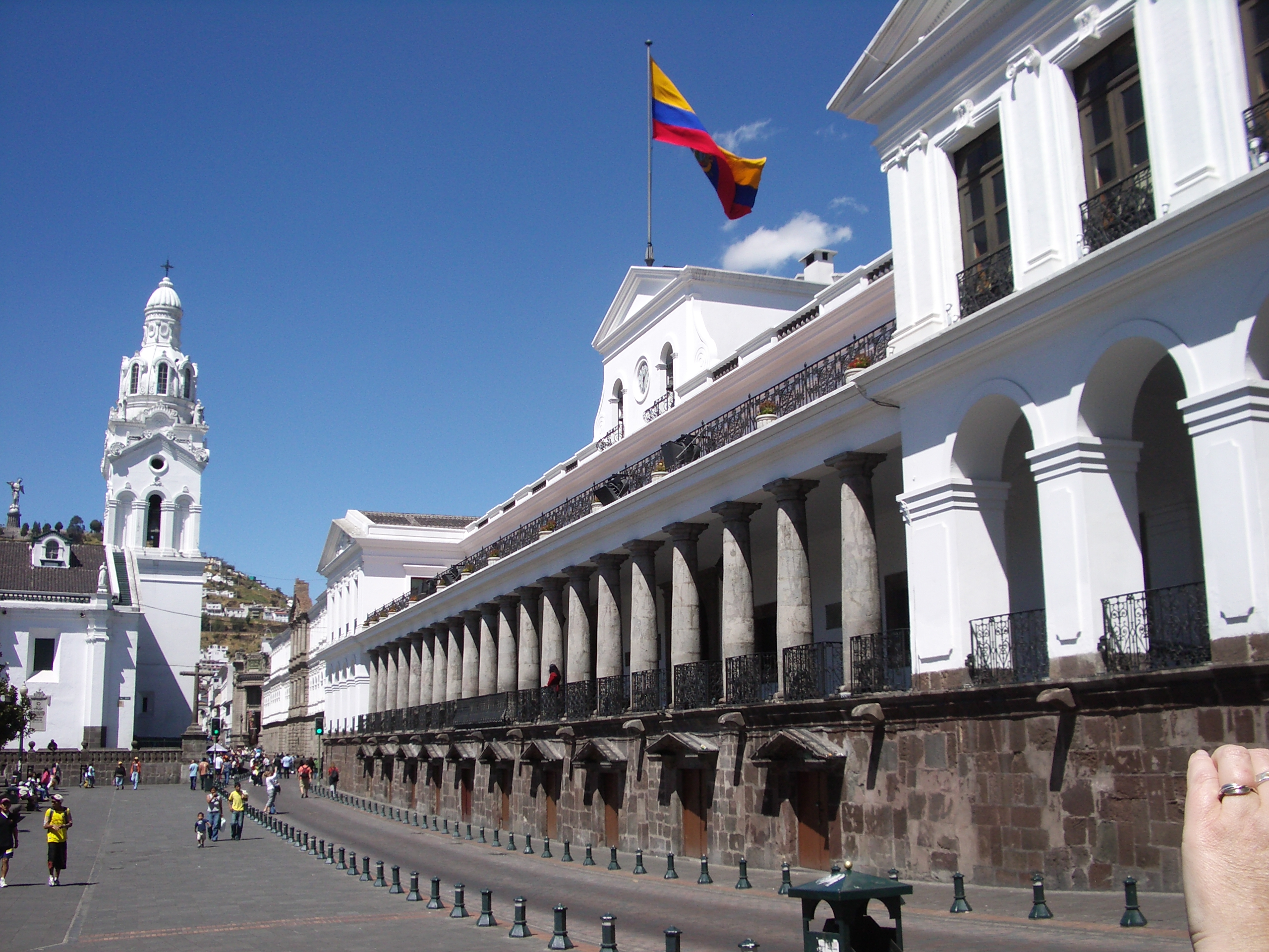 Quito, Ecuador